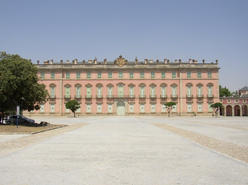 Segovia. (Castilla-León. España) Riofrío. Palacio. Fotografía realizada en agosto de 2004 por el autor. User:Pelayo2